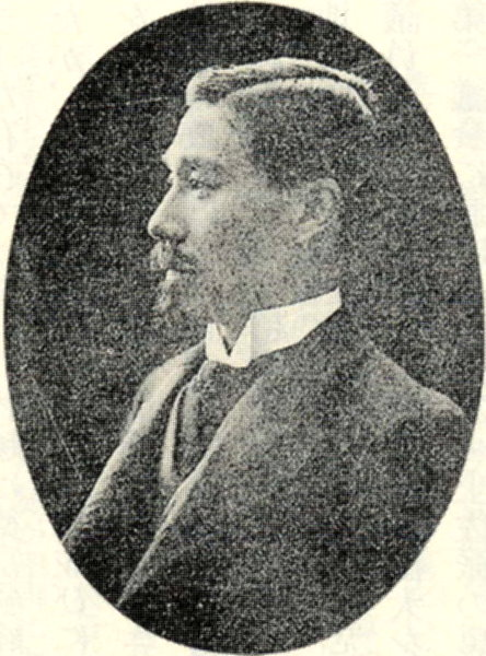 Meiji period Historian Takekoshi Yosaburo。竹越与三郎（三叉）。雑誌『世界之日本』主筆。枢密顧問官。正四位勲一等瑞宝章。慶應義塾評議員。